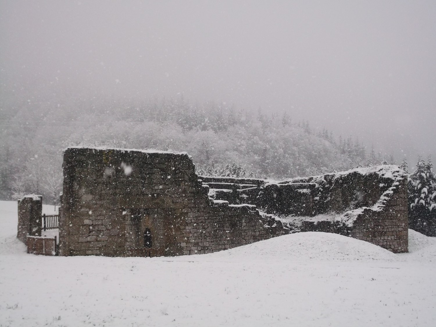 Ruinas de la casa torre de Zaldibar en invierno